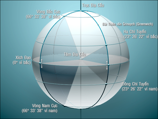 Minh hoạ năm đường vĩ tuyến đặc biệt của Địa Cầu